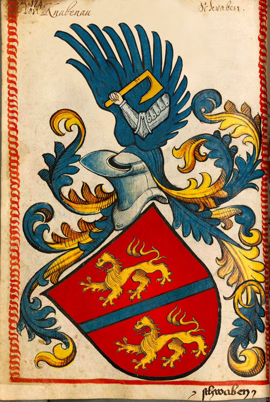 Scheibler'sches Wappenbuch, älterer Teil Von Knabenau Schwaben (irrtümlich?)